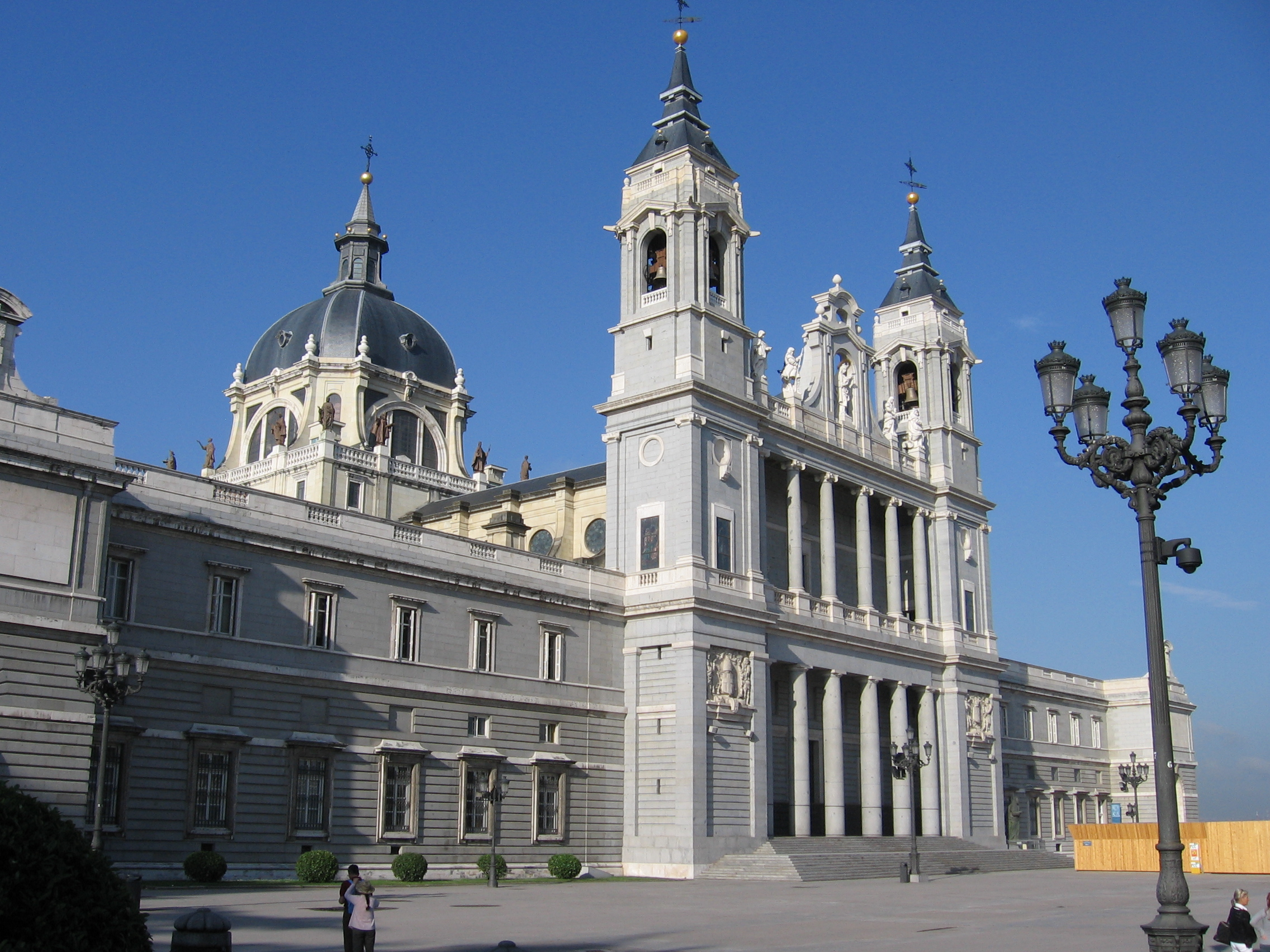 Catedral de la Almudena, Madrid